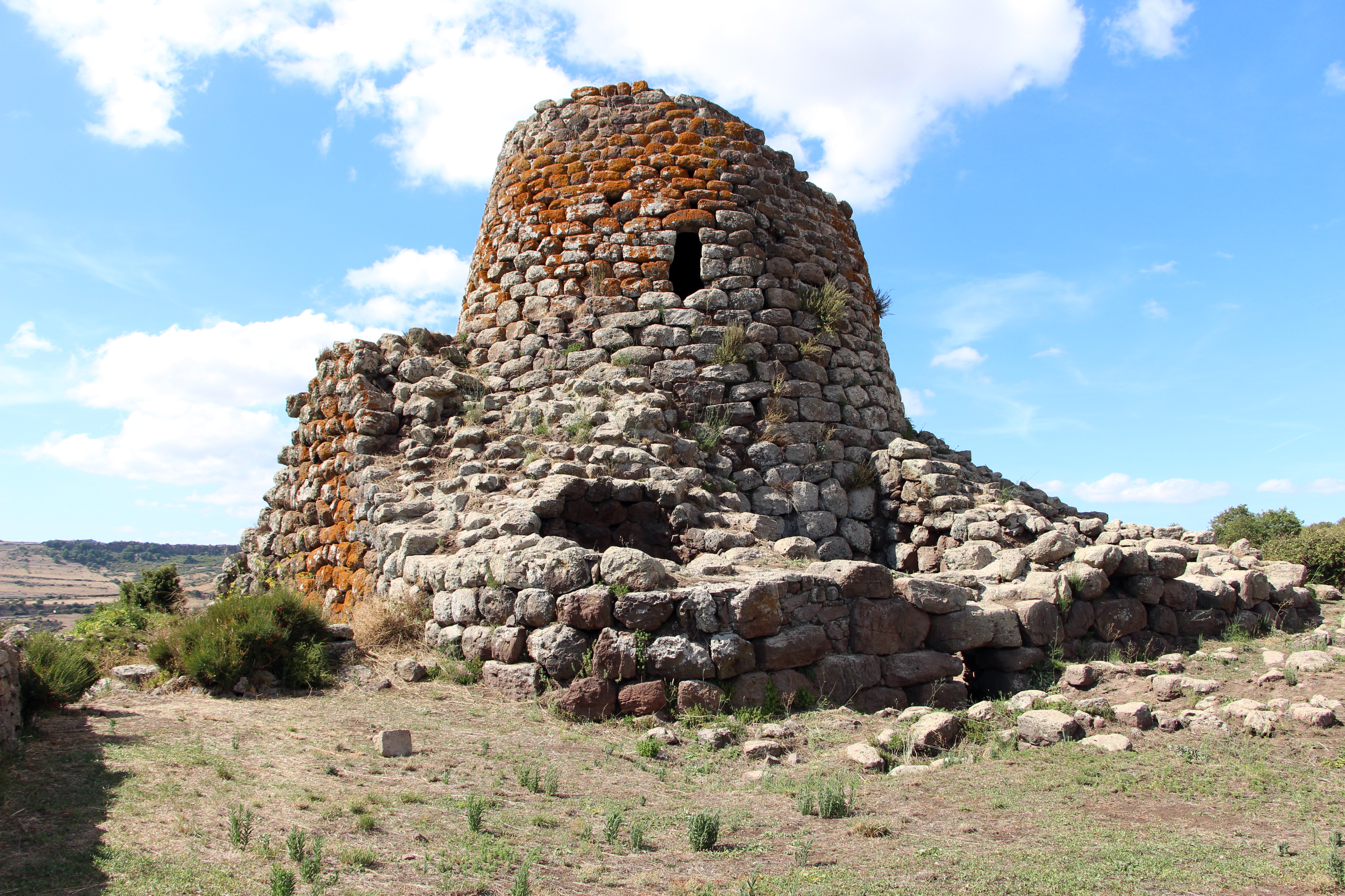 Macomer